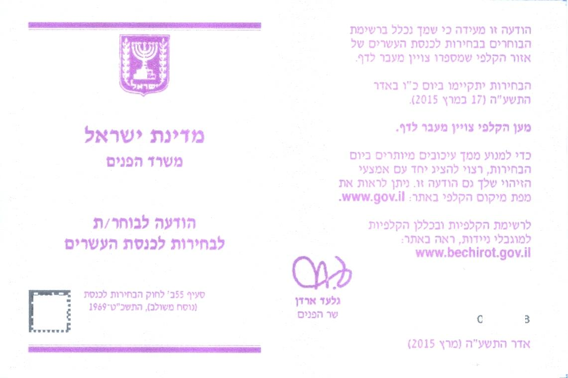 הודעה לבוחר 2015